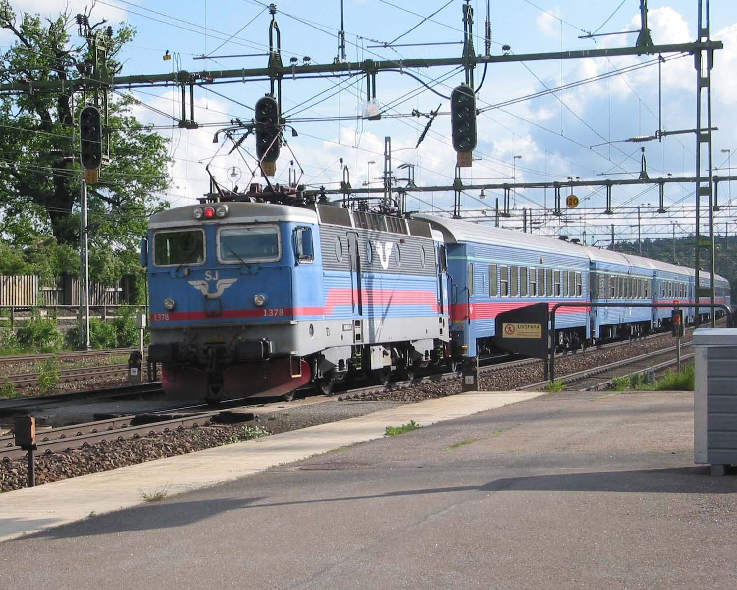 SJ train number SJ Rc6 1378 at Älvsjö station in Stockholm.